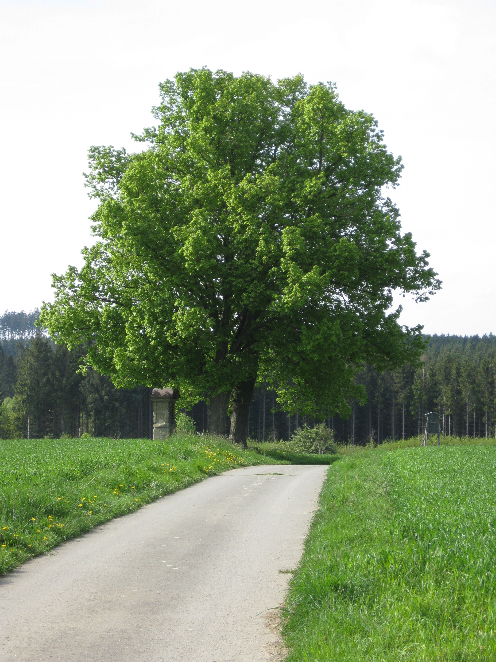 Lieberg, Bildstock und Naturdenkmal 2 Linden, Brilon-Scharfenberg, Nordrhein-Westfalen, Deutschland.